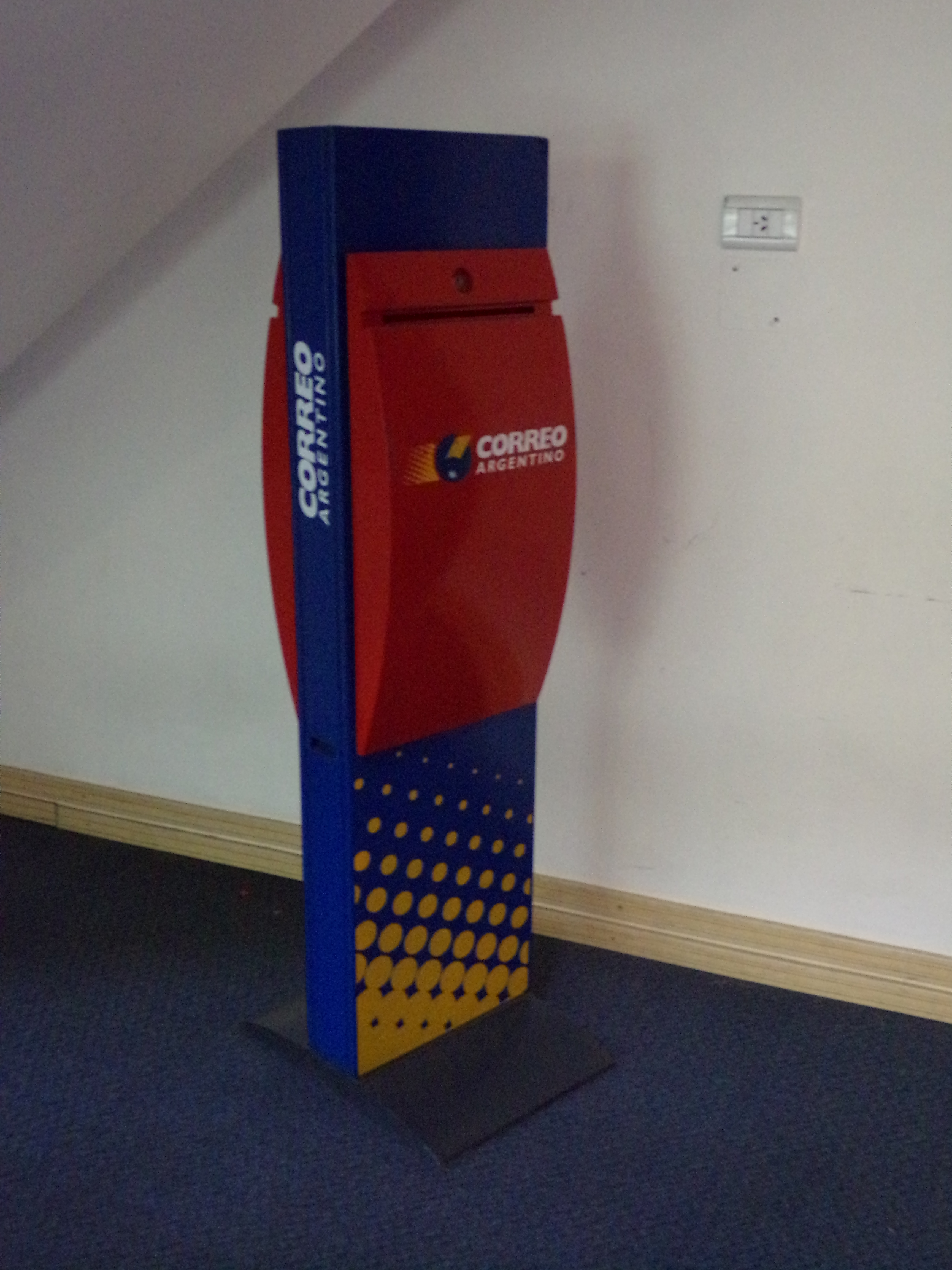 USH - Malvinas Argentinas Airport, Ushuaia, Tierra del Fuego, Argentina